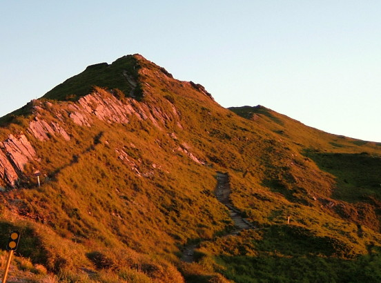 旭日映照下的石門山